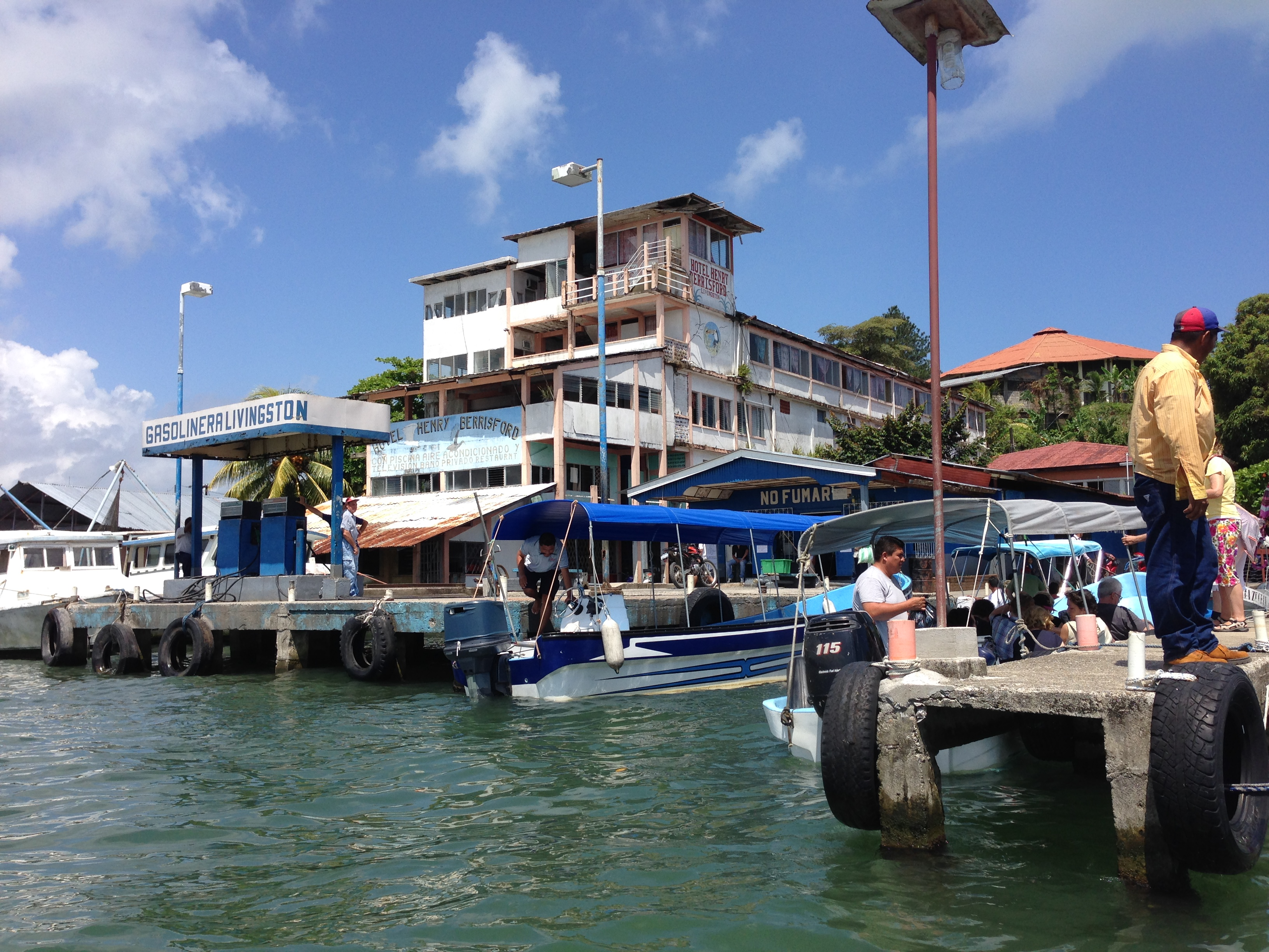 Hafen Livingston Guatemala